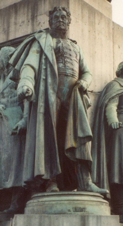 Friedrich Graf Kleist von Nollendorf als Sockel-Standbild am Reiterstandbild des Preußenkönigs Friedrich Wilhelm III. auf dem Kölner Heumarkt